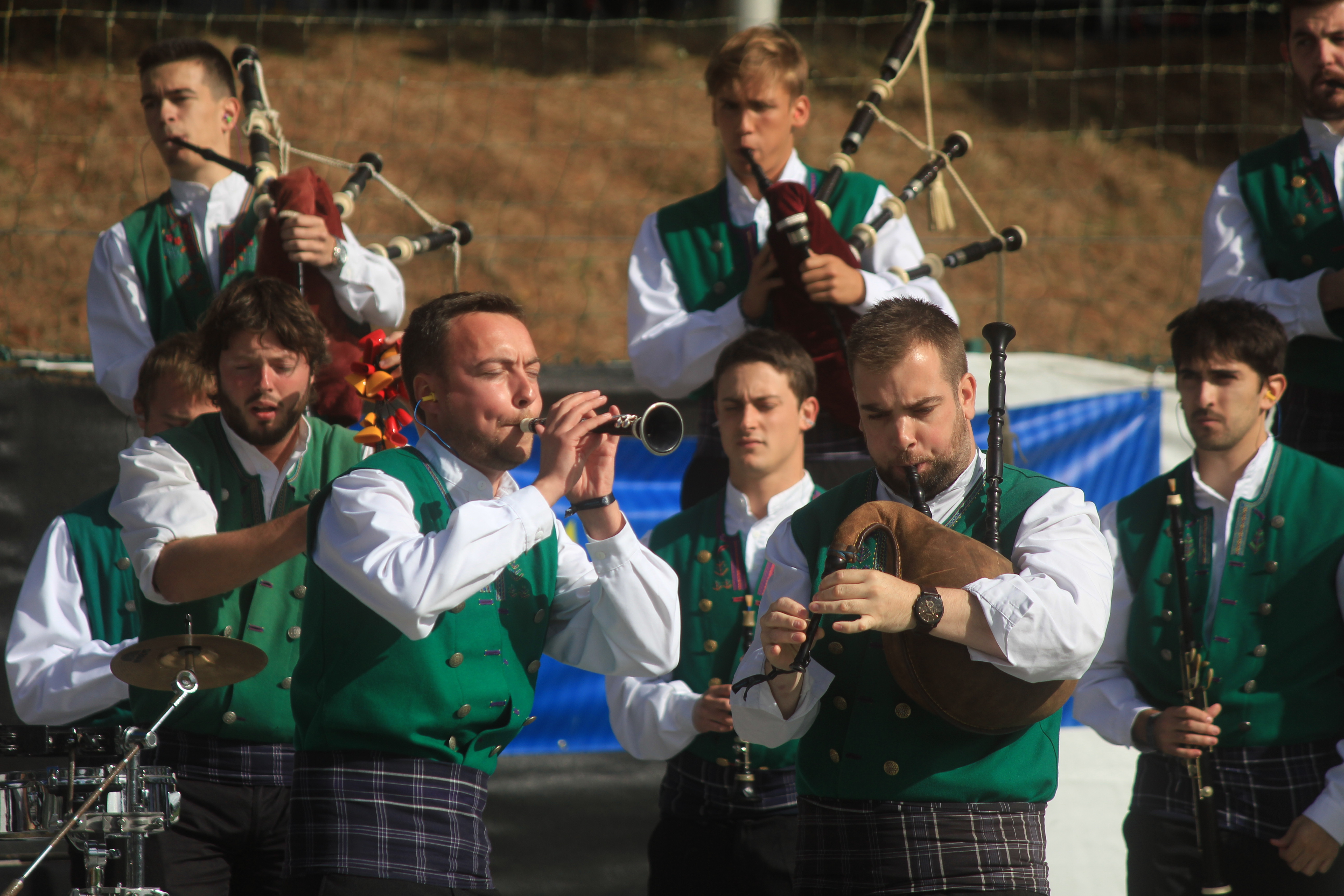 Le Bagad Plougastell lors du festival interceltique de Lorient 2017.